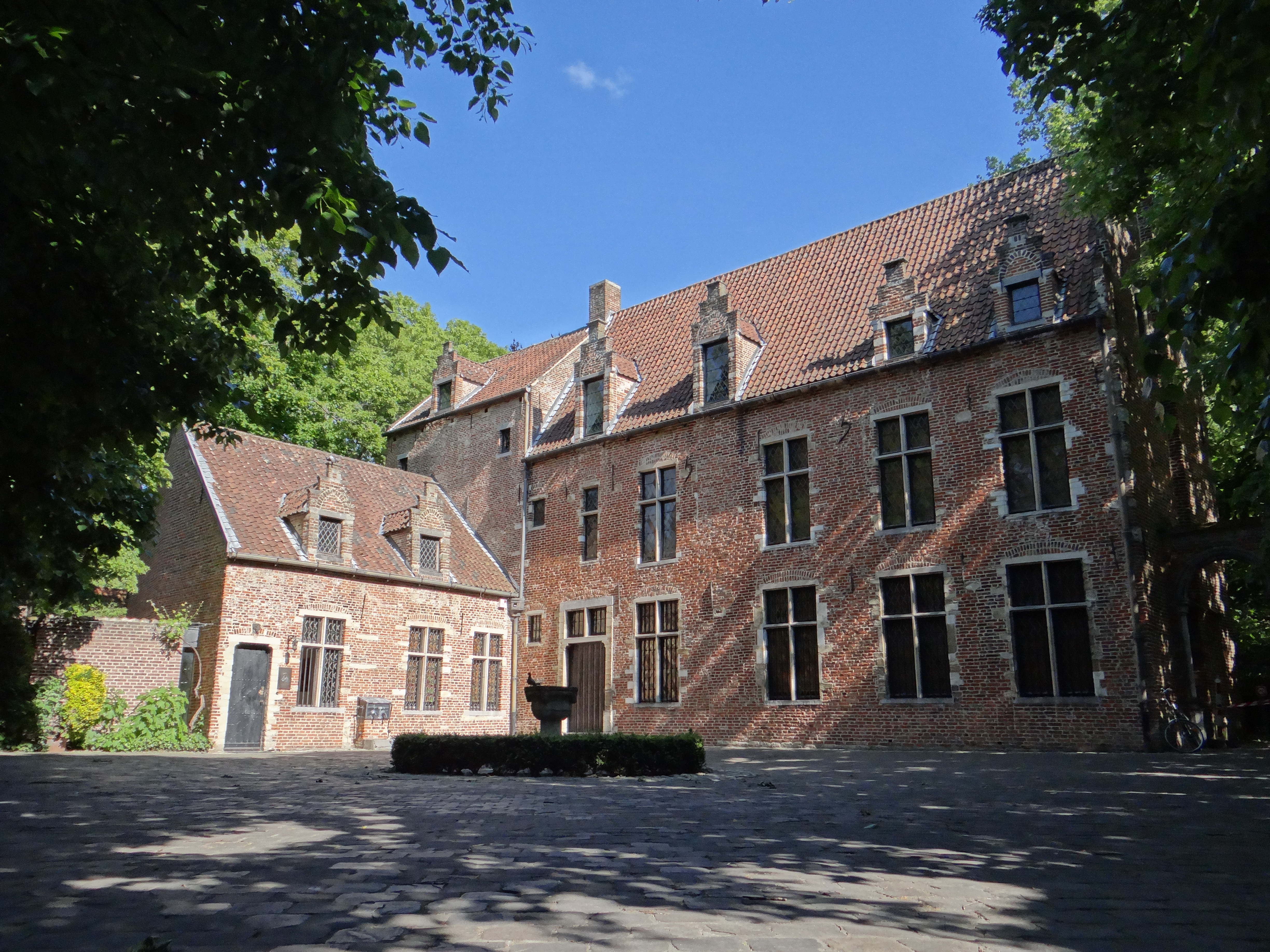 Maison d'Érasme, à Anderlecht, vue depuis la cour.